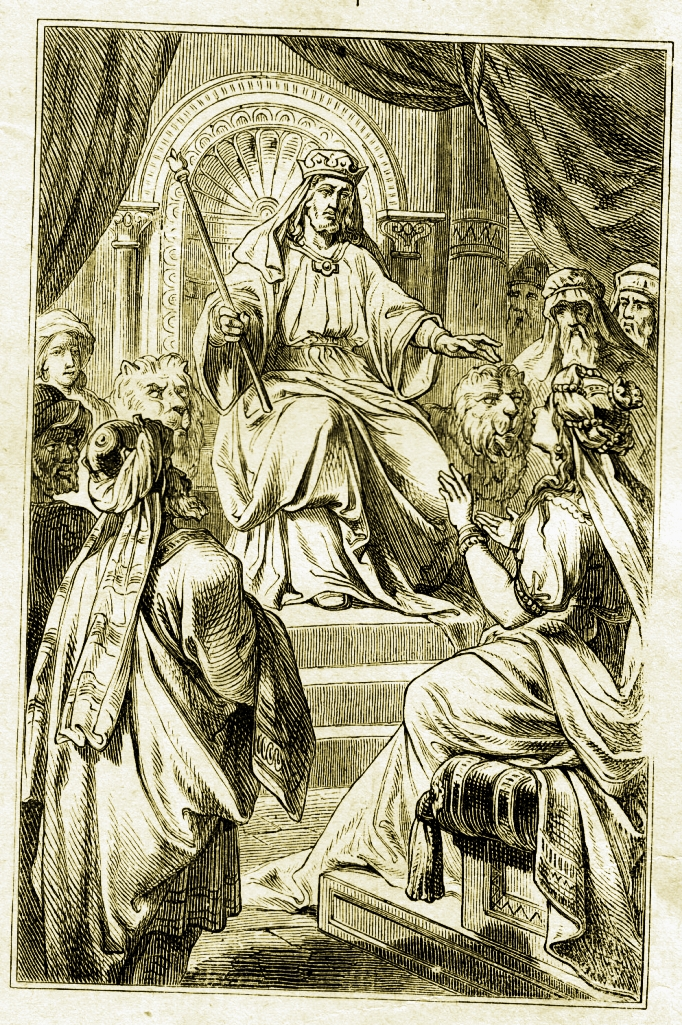 "Salomon na tronie". Rycina ze schrobenhausenowskiego warsztatu Carla Poellath